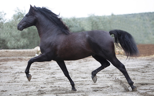 Caballo pura raza español, reportaje para la revista El Mundo del Caballo de la Ganadería Francisco Santiago